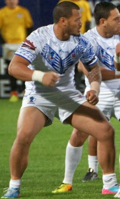 Le Siva Tau de l'équipe nationale de rugby à XIII des Samoa le 11 novembre 2013 à Perpignan.